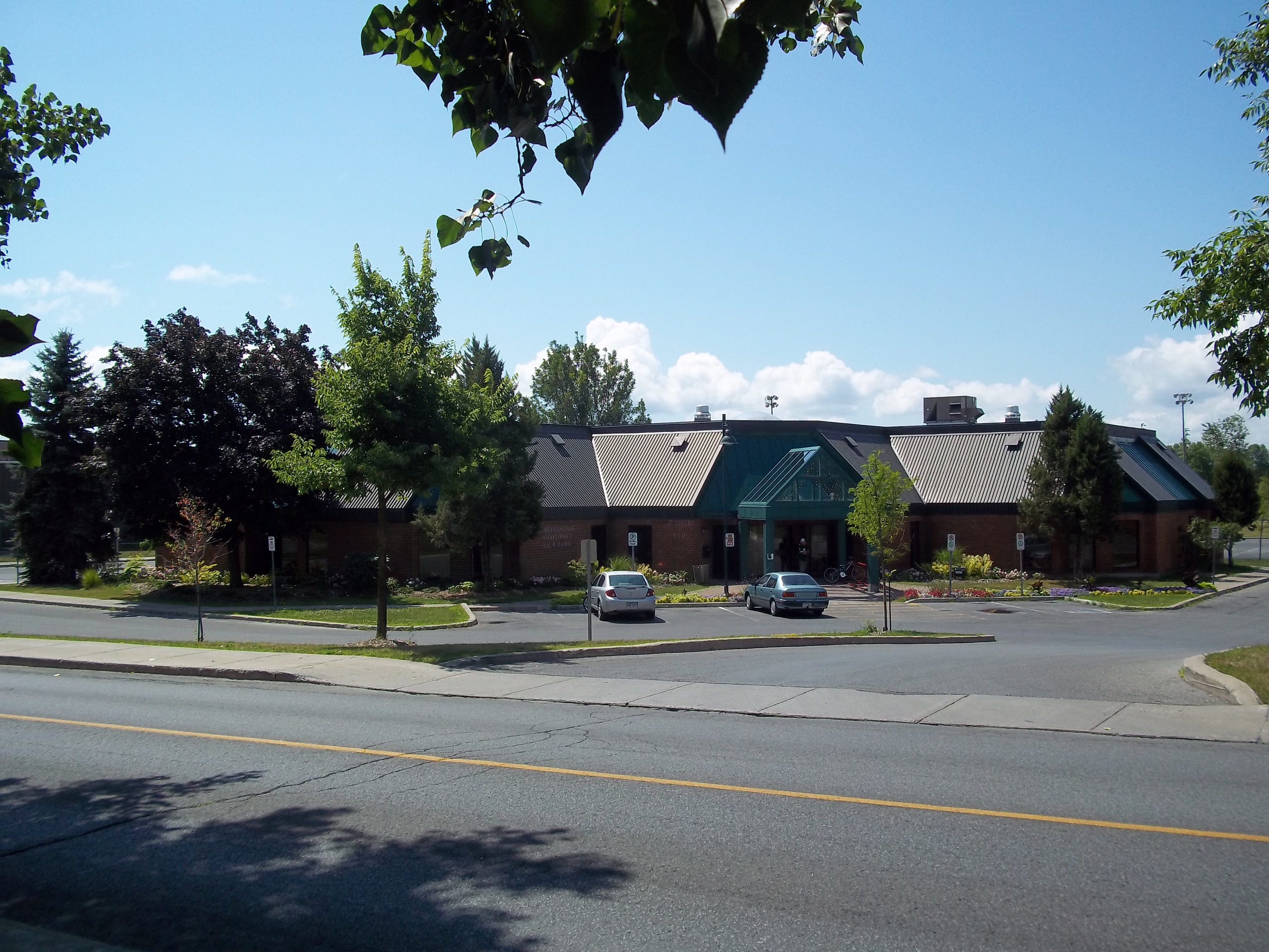 Bibliothèque L'Île-Bizard, 500, montée de l'Église, L'Île-Bizard–Sainte-Geneviève (Montréal)